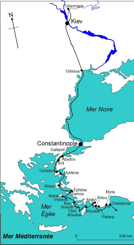 Itinéraire vers la Terre Sainte de l'abbé Daniel